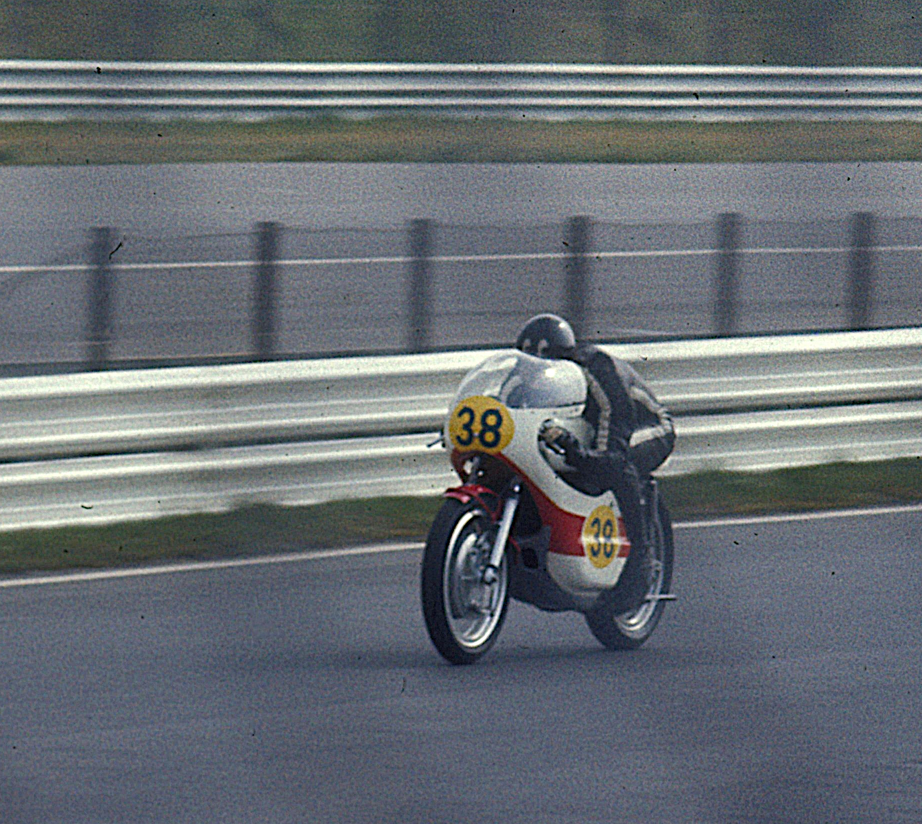 Edmund Czihak auf Yamaha beim Training, Gewinner der Klasse bis 500 cm³ beim Eifelrennen 1974, das die meisten Motorradfahrer wegen ungenügender Sicherheit der Strecke boykottierten. Chihak fuhr die 7 Runden auf der Nürburgring-Nordschleife in 1:12:19,9 Stunden bzw. mit einem Durchschnitt von 132,6 km/h.